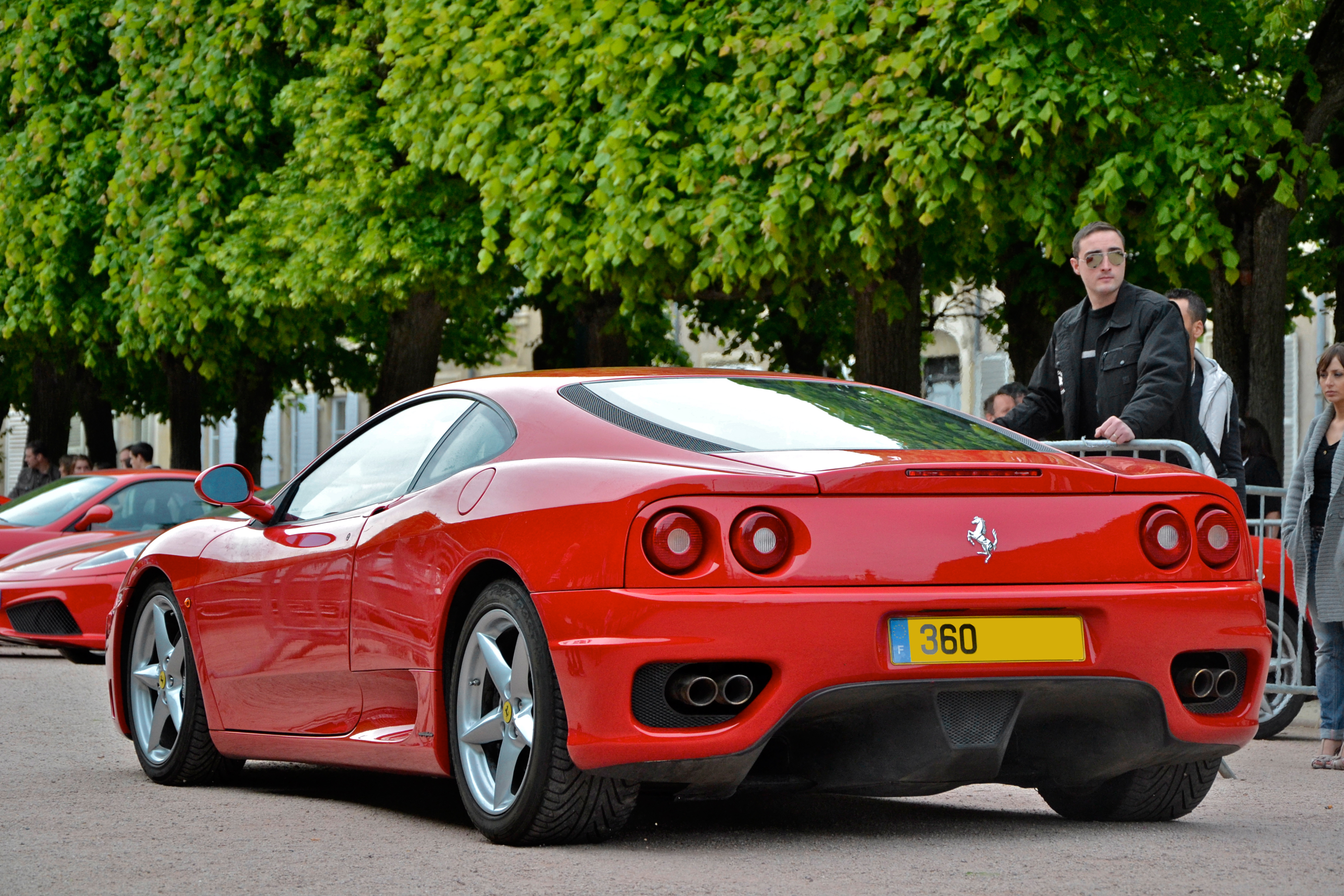 Ferrari 360 Modena